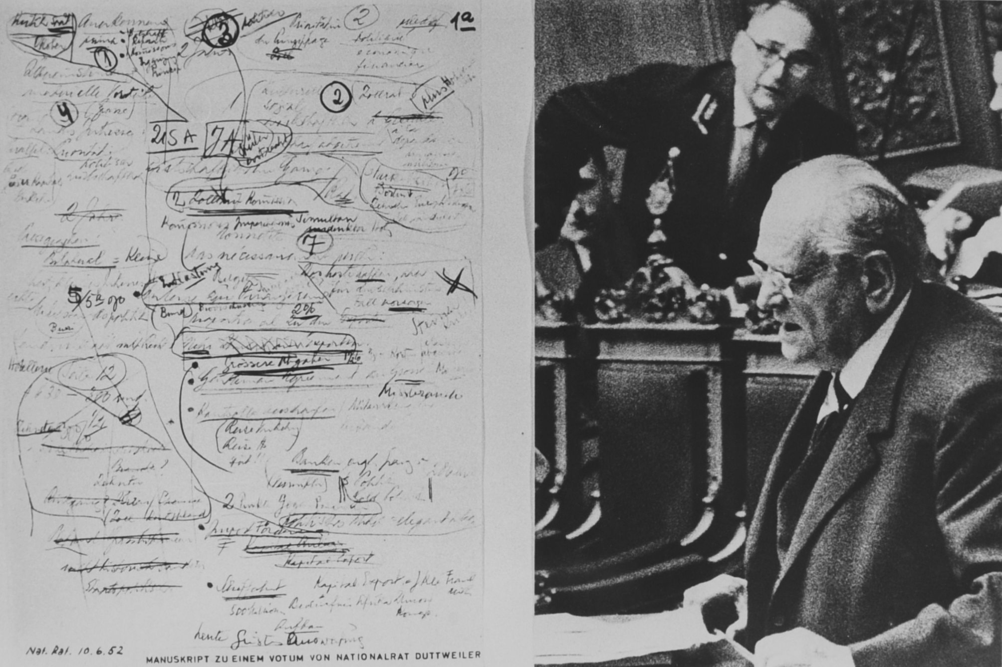 Gottlieb Duttweiler im Nationalrat, Manuskript, Handschrift